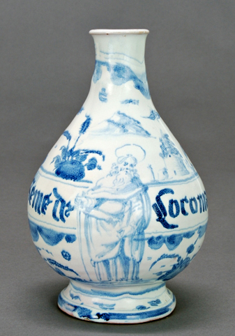 Fiasca da farmacia dipinta con San Paolo e decori a tappezzeria. Savona XVII secolo